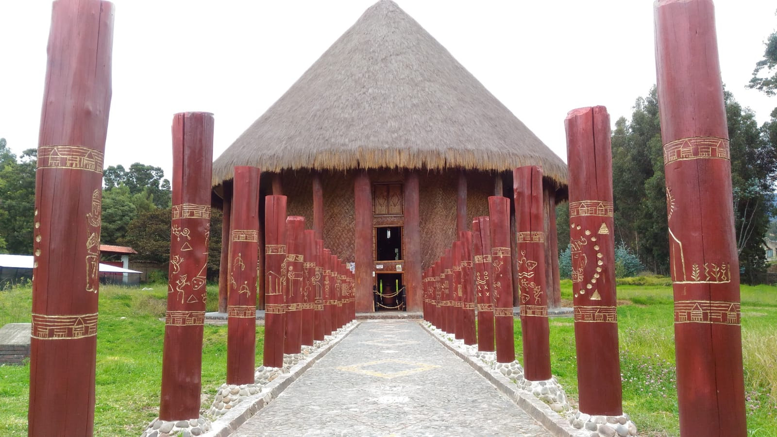 Templo do Sol en Sogamoso.